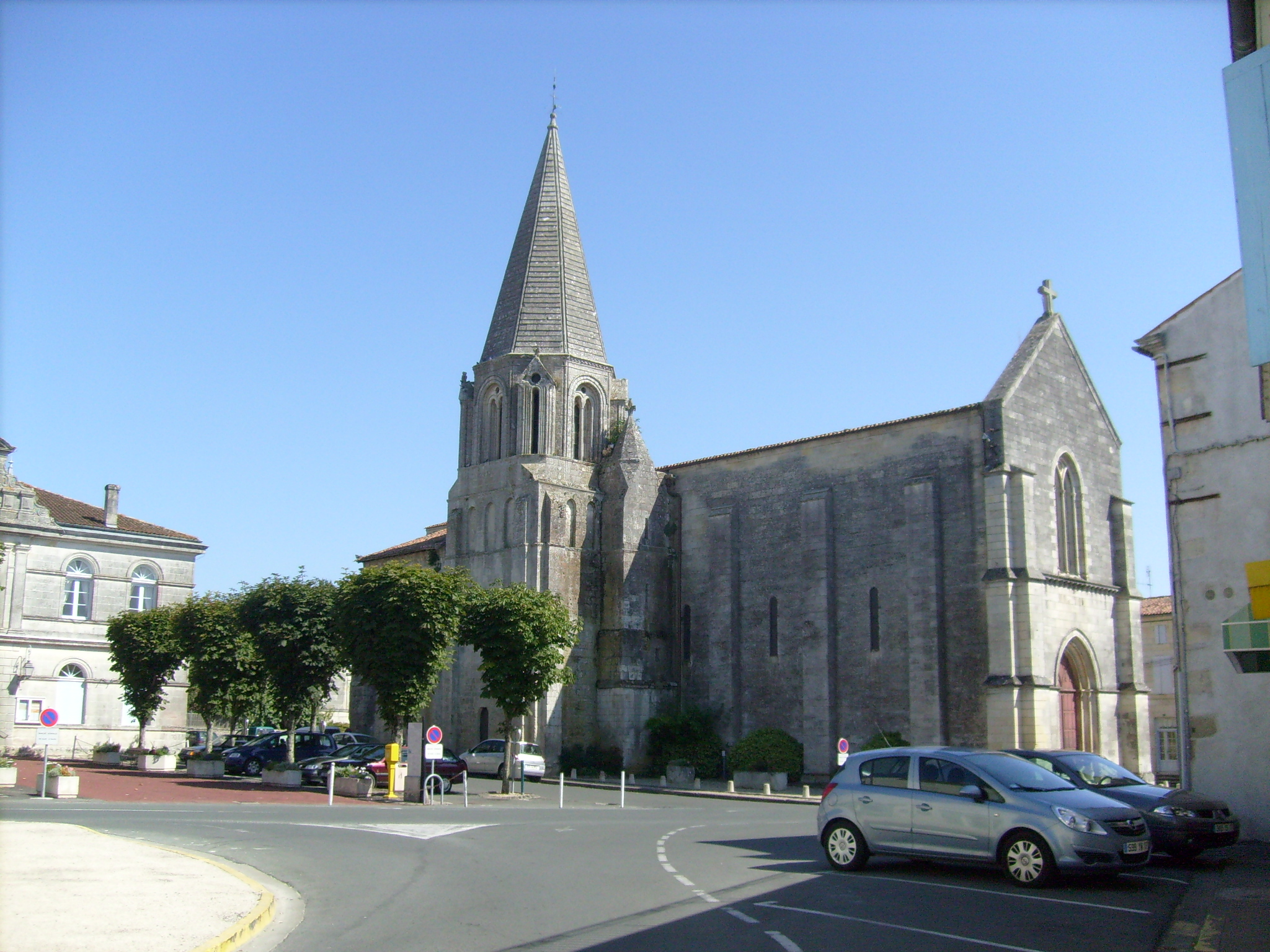 L'église Saint-Pierre de Gémozacavec la place et la mairie.